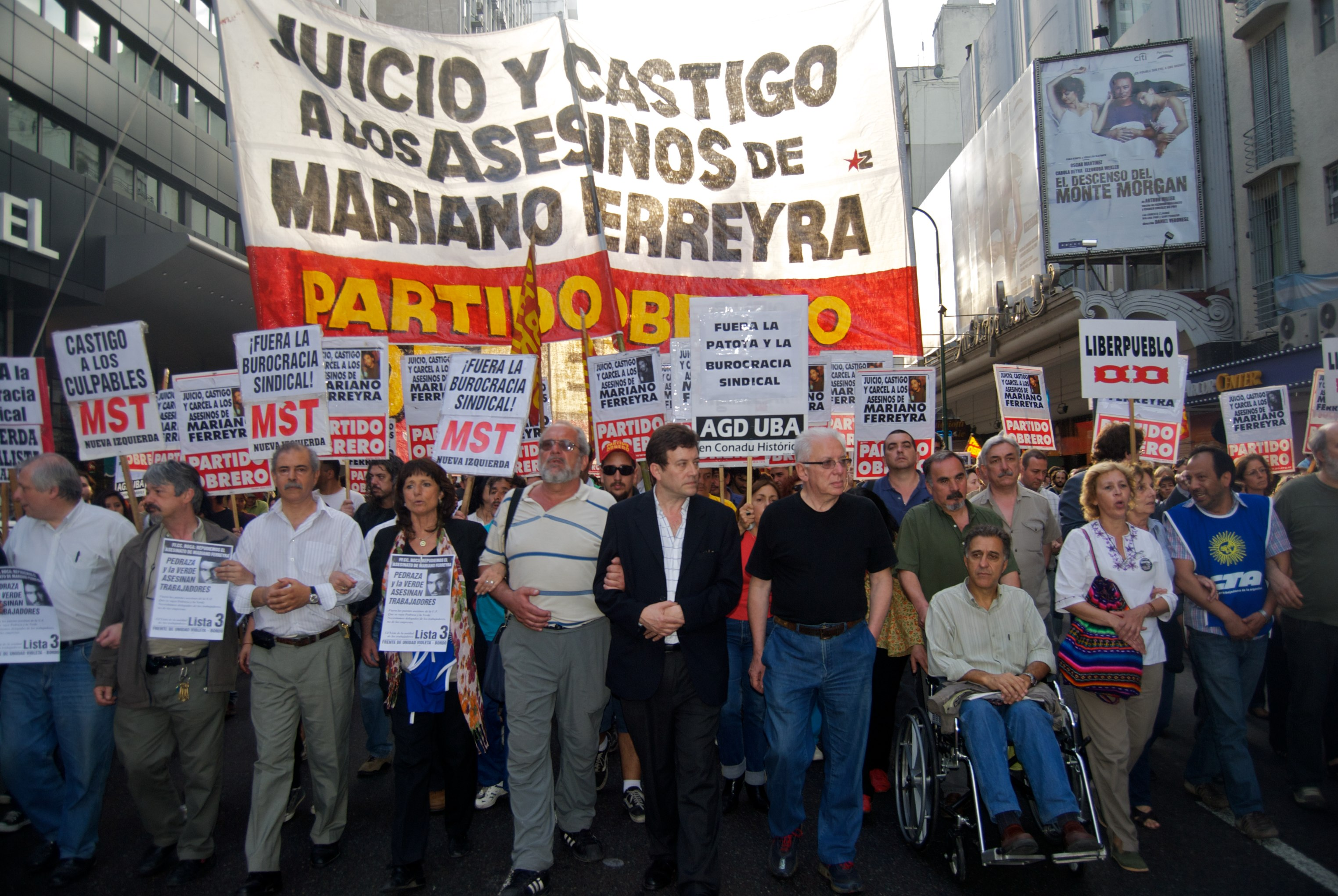 Cabecera de la marcha realizada el 21/10/2010